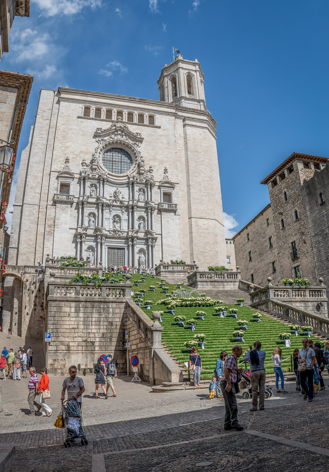 _DSC4246-Editar_flickr